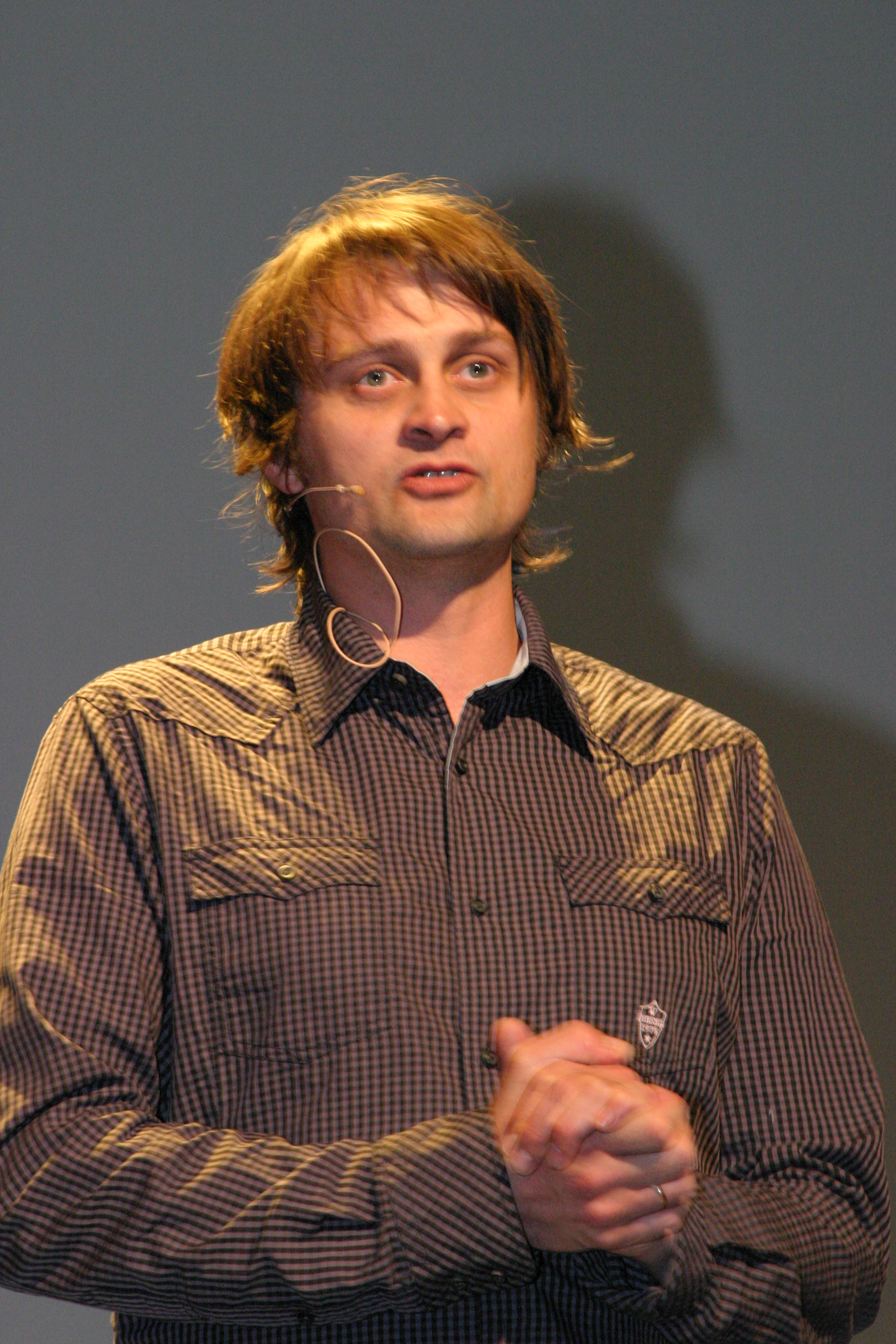 IMG_20070511_1139.JPG